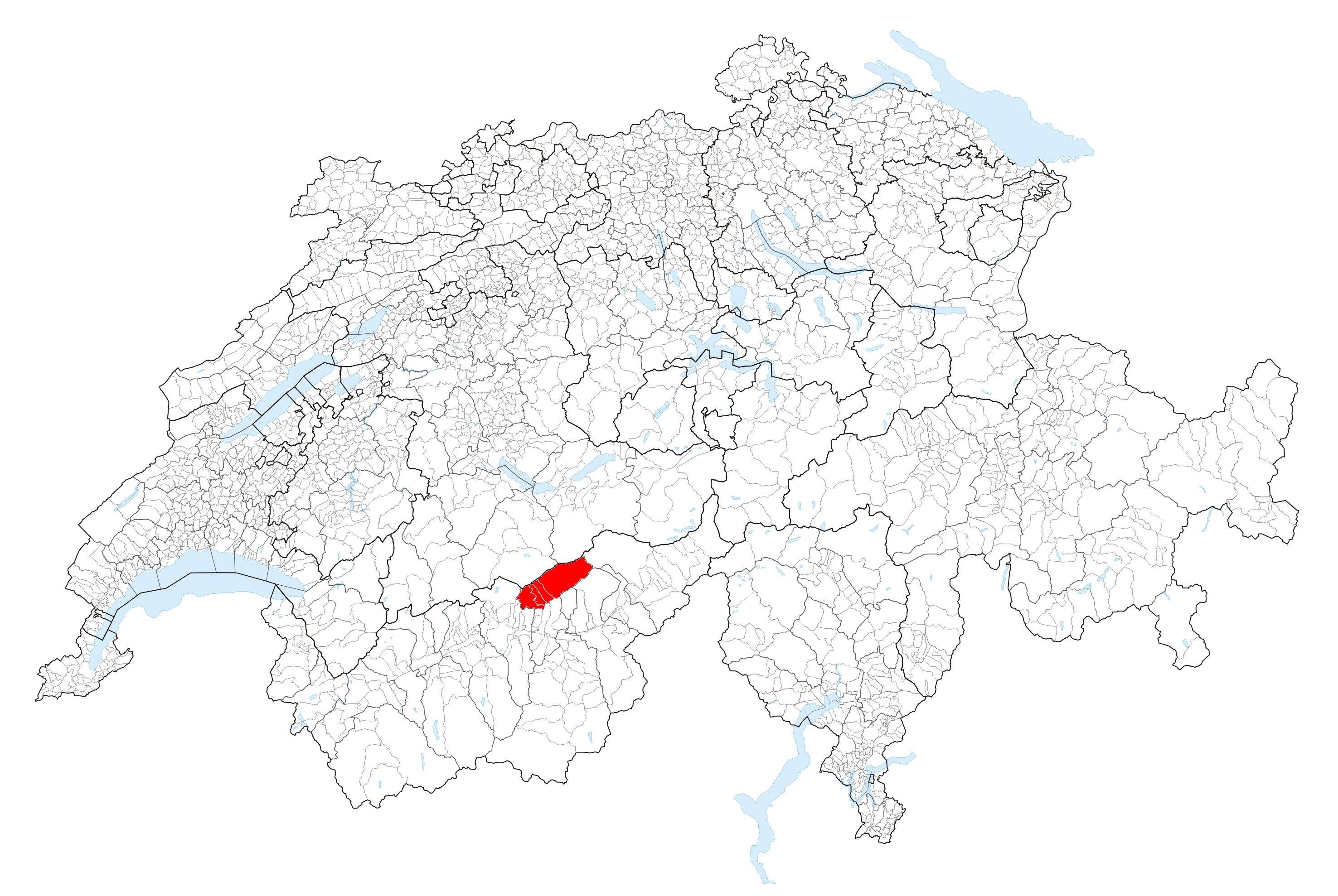 Karte Gemeinden der Schweiz, Lötschental hervorgehoben.